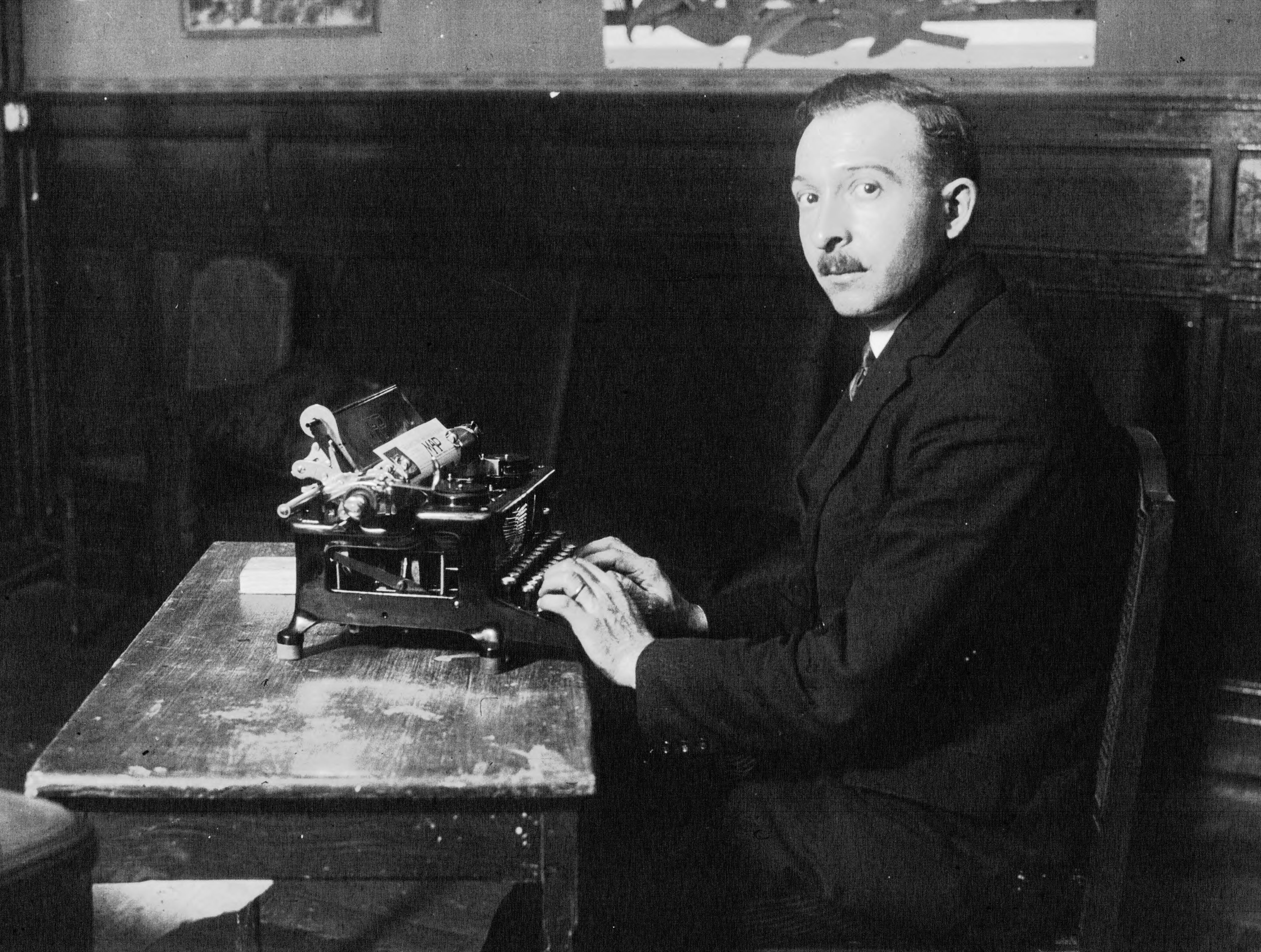 M. Sarvin, champion de dactylographie, France